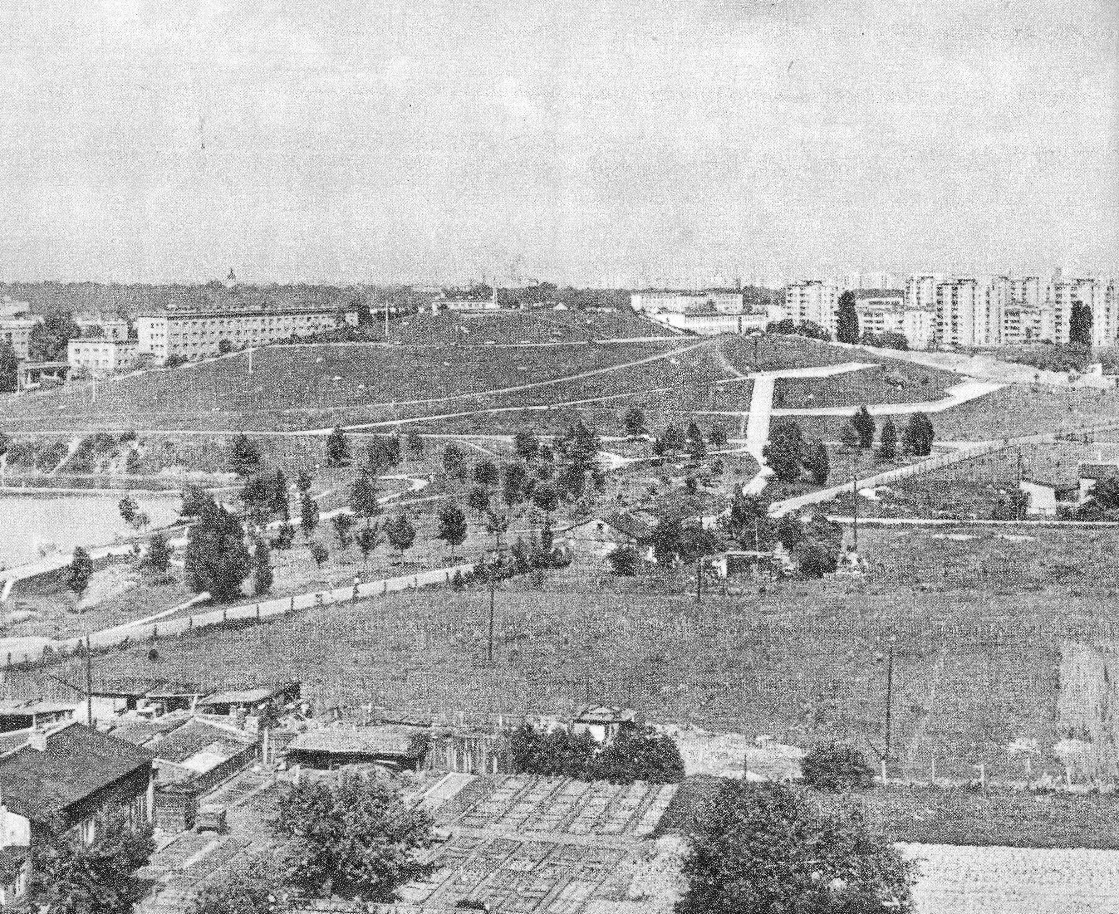 Park Moczydło w Warszawie